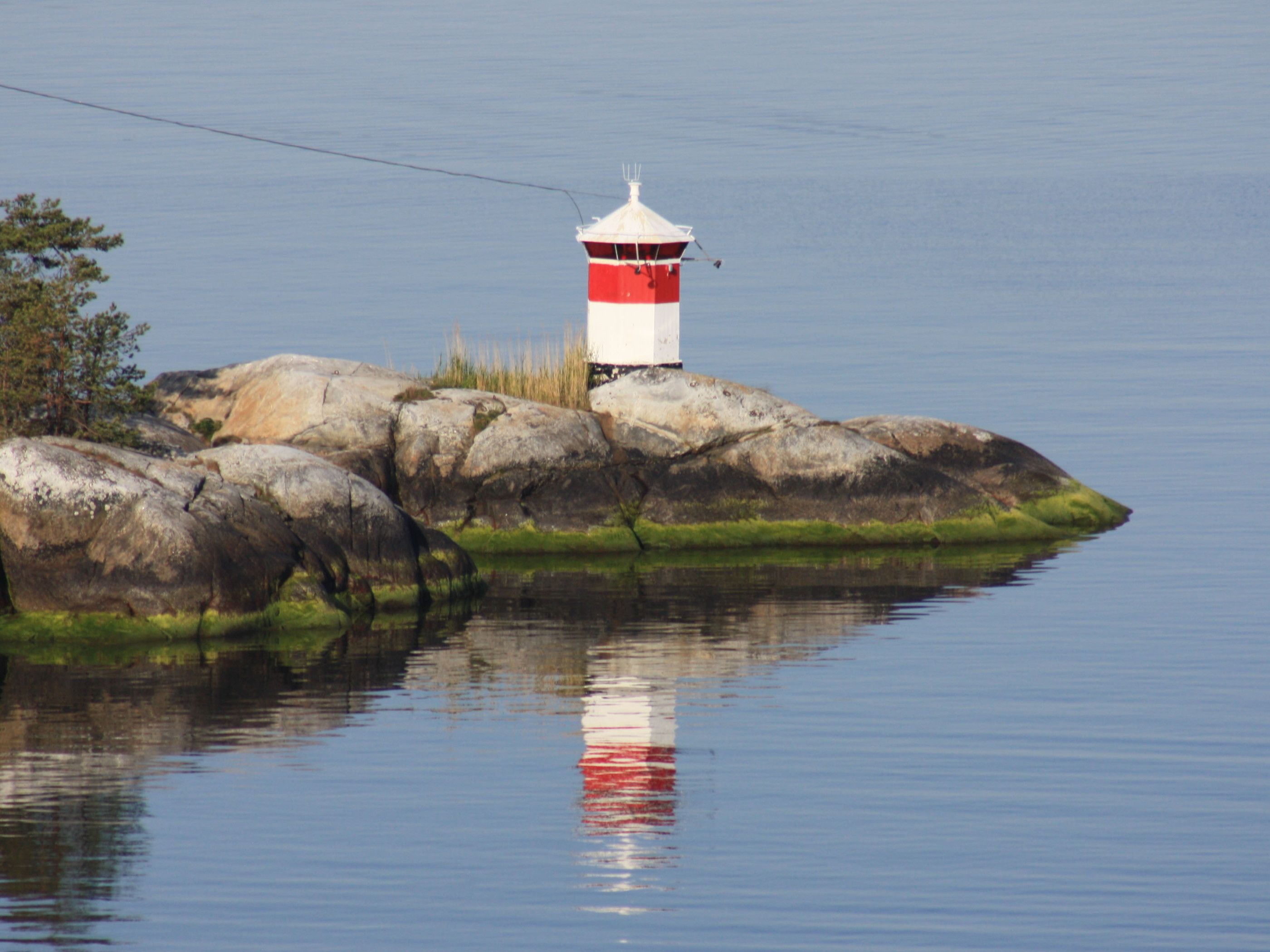 Granholmens fyr, Vaxholms kommun, Stockholms skärgård